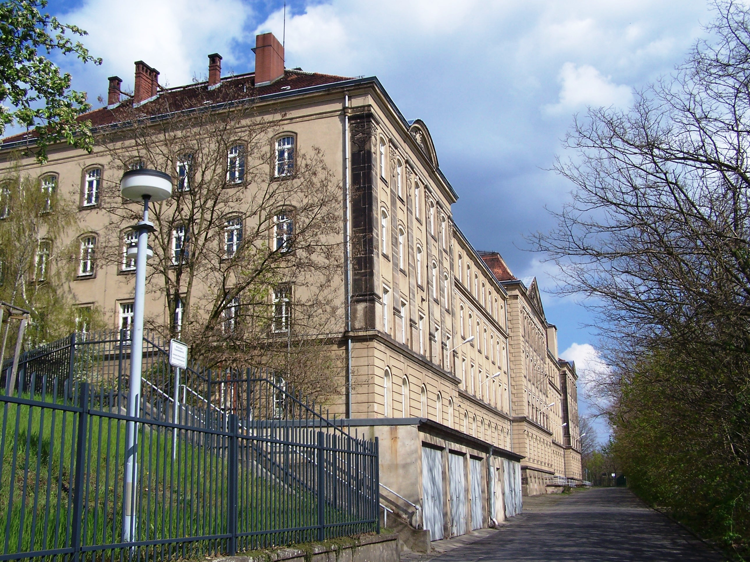 Teil der Kasernenanlagen der Dresdner Albertstadt, 1945 bis 2002 als Sächsische Landesbibliothek genutzt